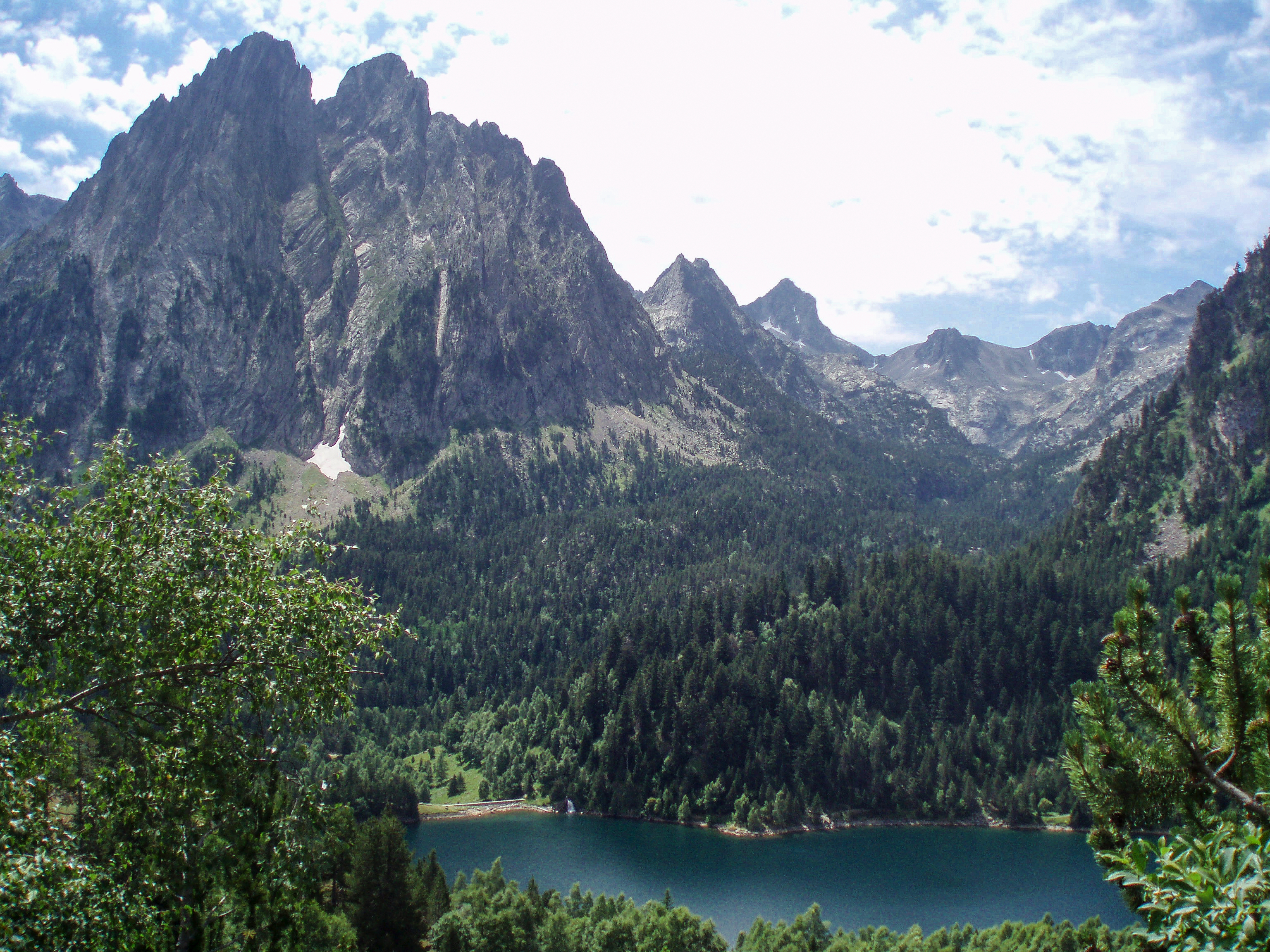 Els Encantats, en el Parque Nacional de Aigüestortes (Lérida, España).